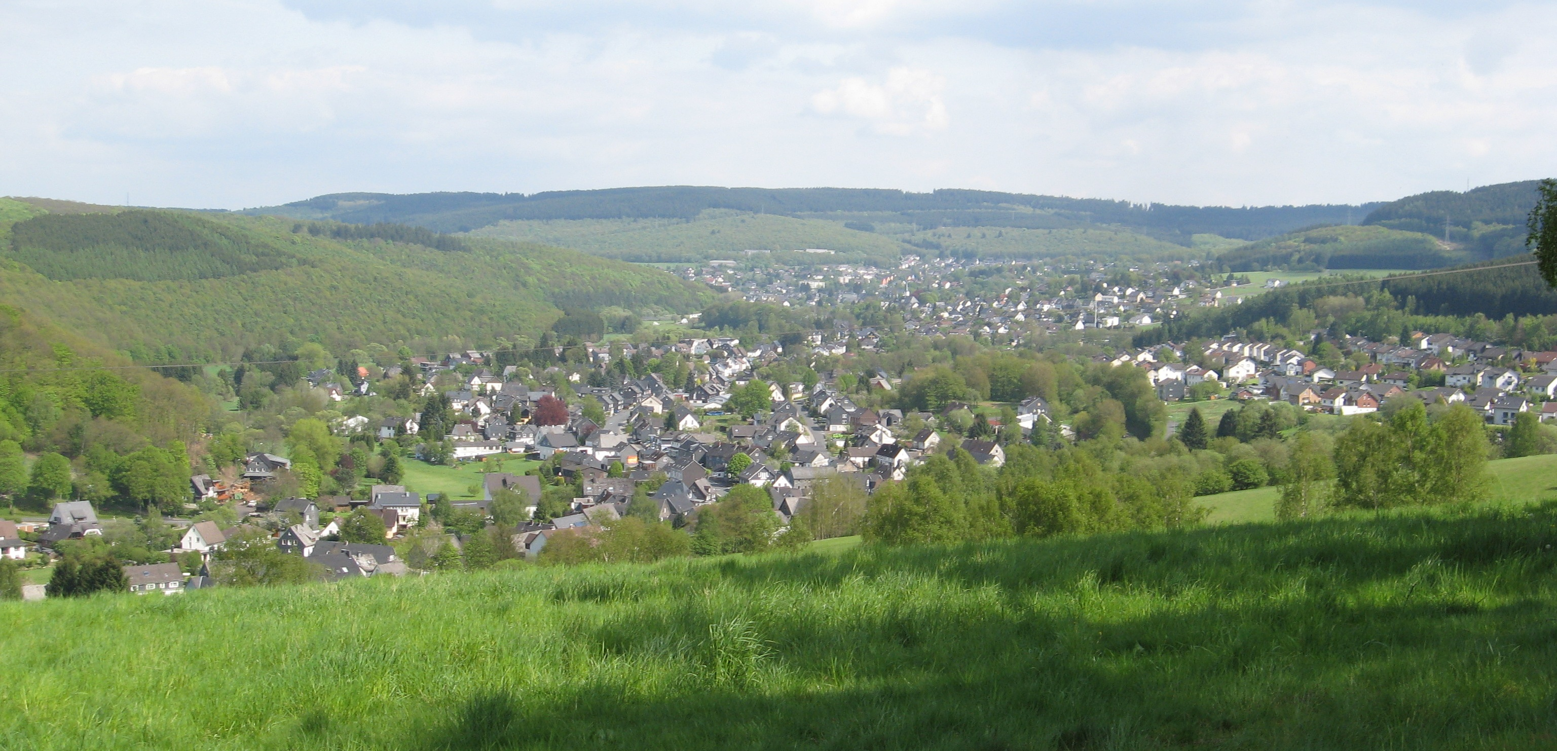 Wahlbach (Vordergrund); Burbach (Hintergrund) im südlichen Siegerland.